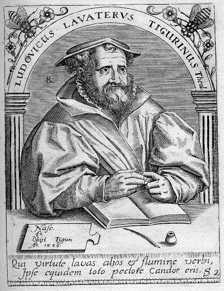 Ludwig Lavater (1527-1586); Züricher Theologe